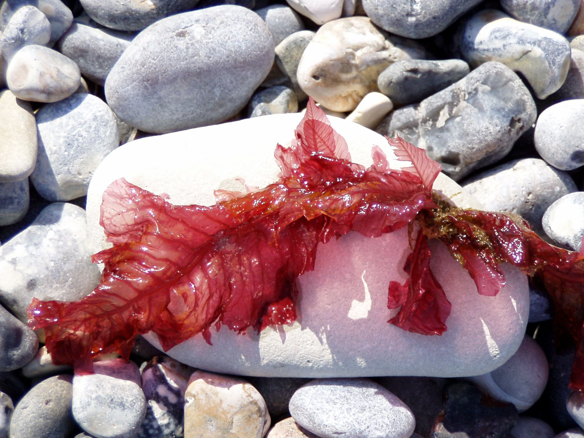 Rotalge auf Düne bei Helgoland Delesseria sanguinea Blutroter Meerampfer